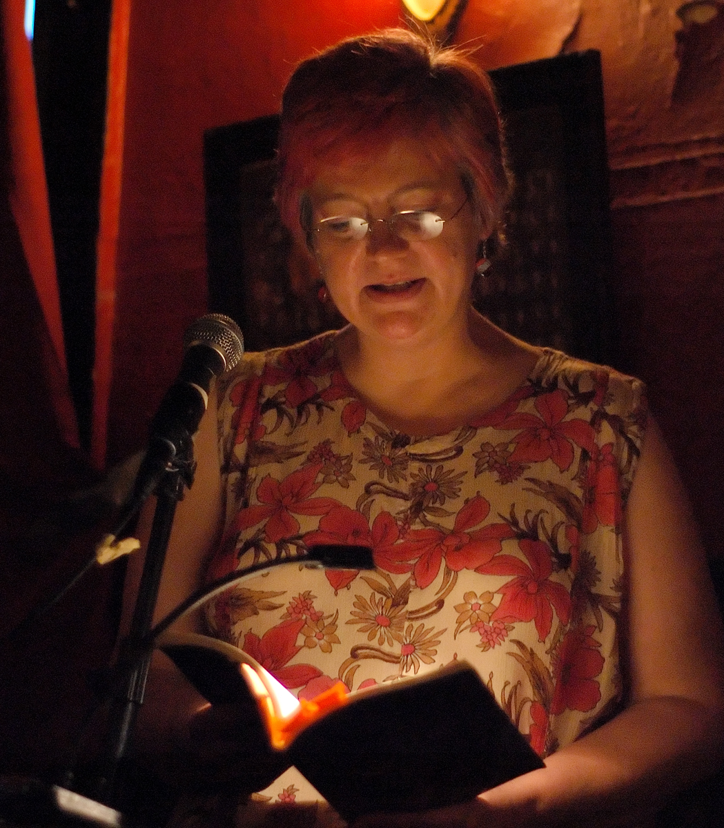 Cat Rambo KGB 2009-07-15